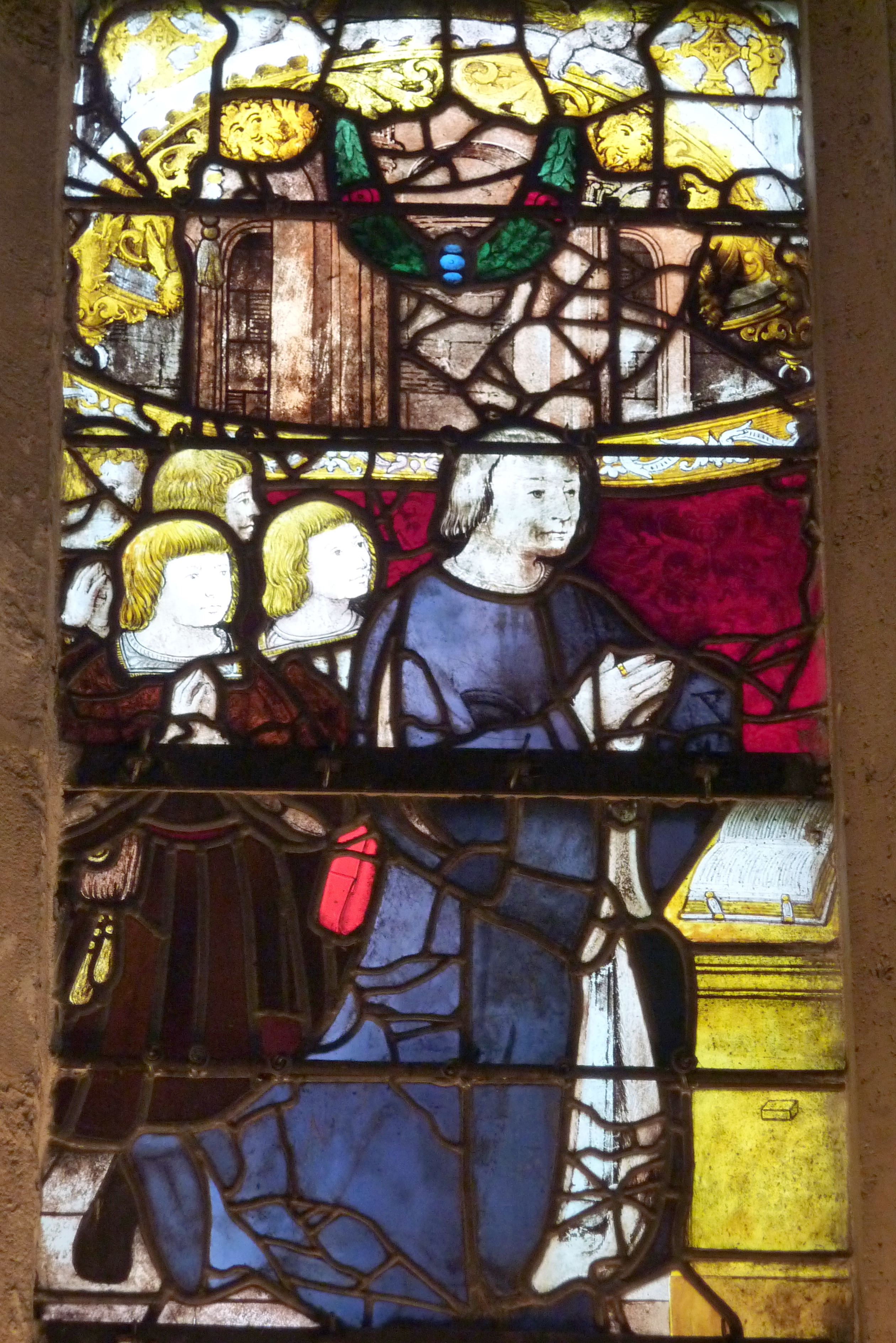 Bleiglasfenster (Ausschnitt) in der katholischen Kirche Notre-Dame-de-Pitié in Puteaux, Stifter mit Kindern